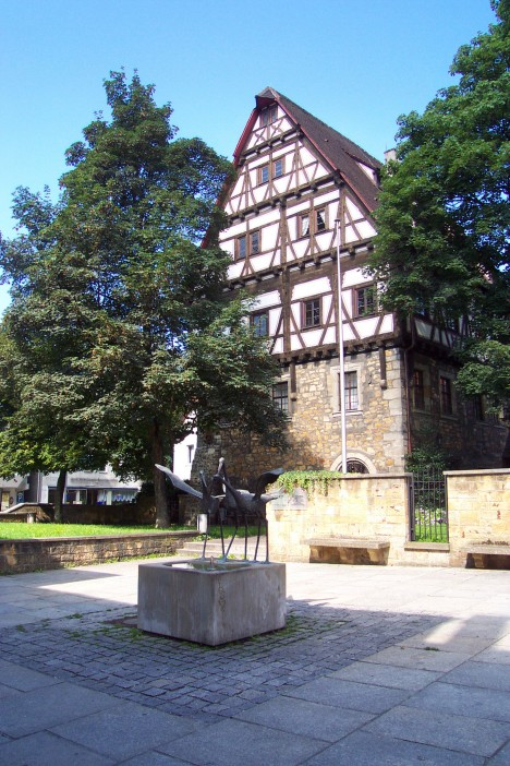 Städtisches Museum Storchen in Göppingen.